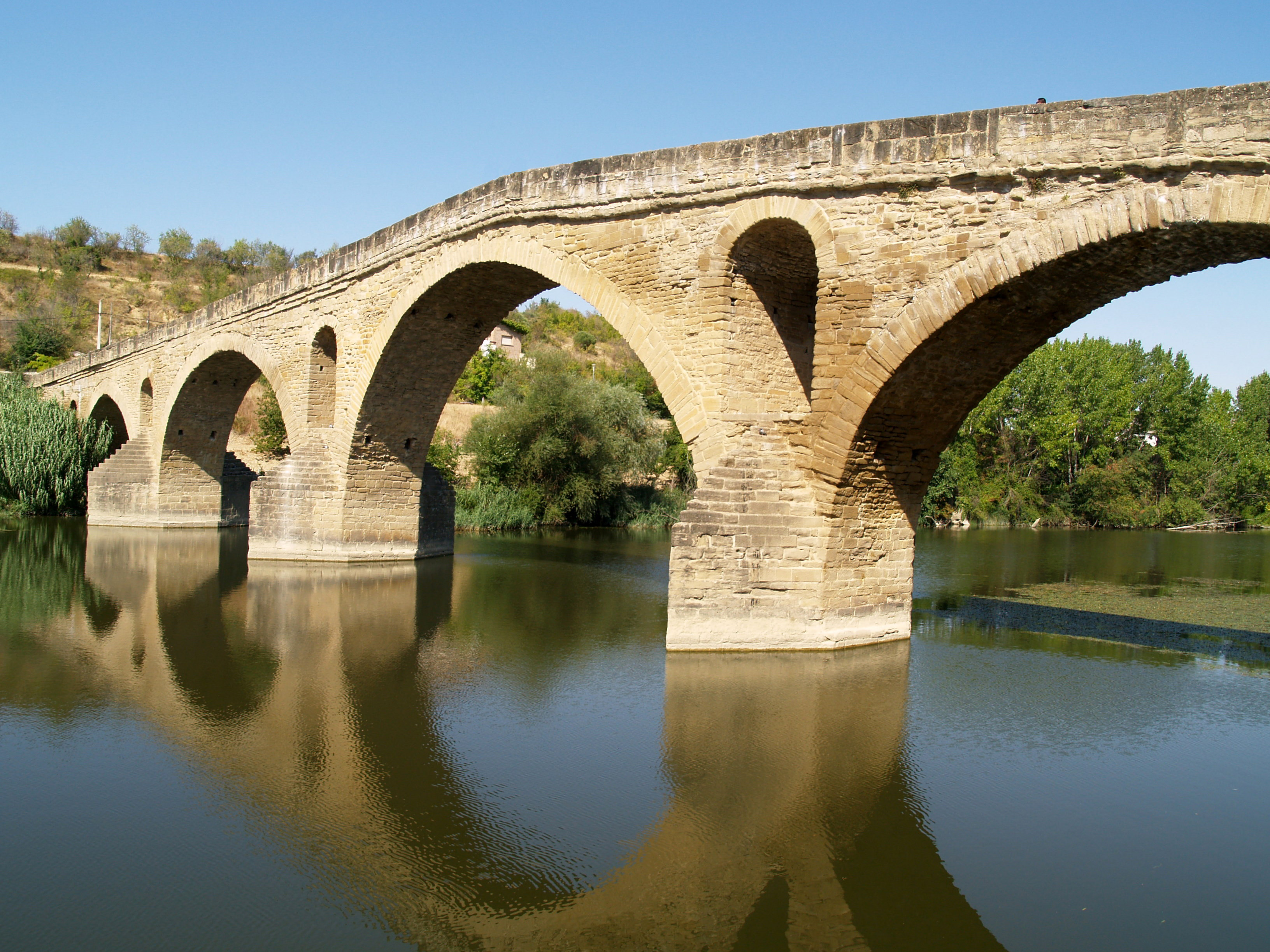 Puente la Reina - Pont romànic